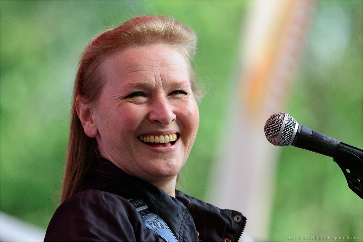 Галина Хомчек, Грушинский фестиваль 2015